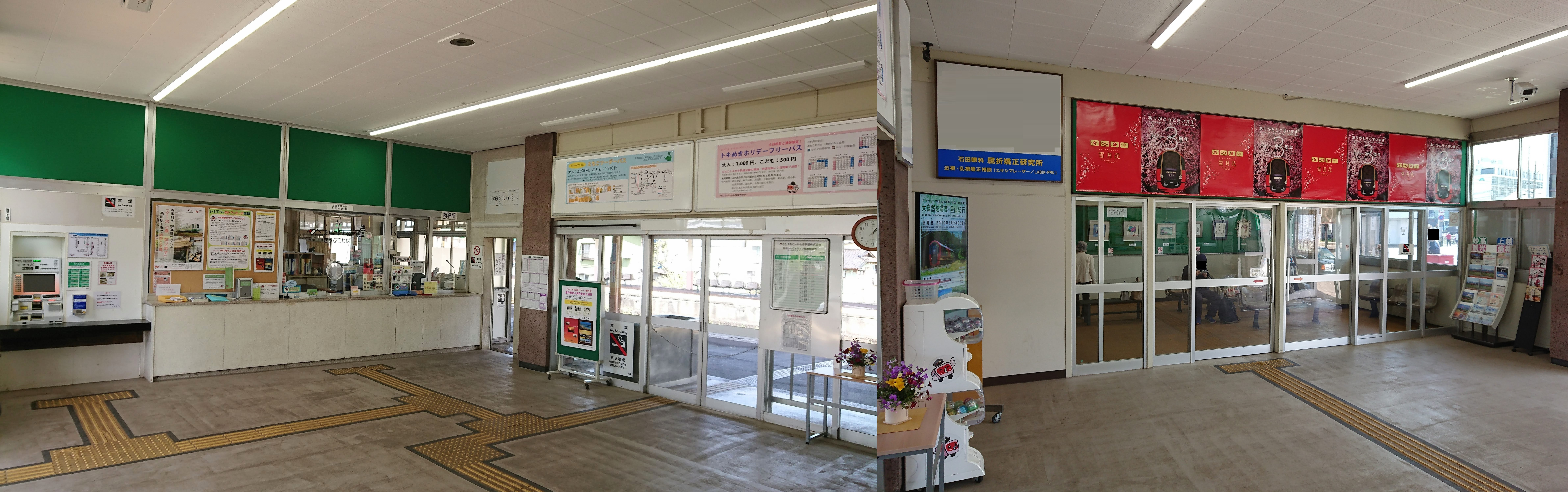 ETR新井駅のコンコース